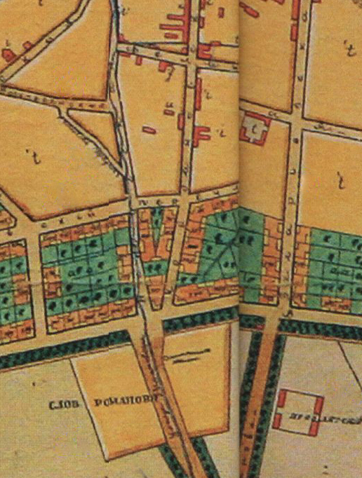 Беларуская (тарашкевіца): Менск (Miensk). Плян места